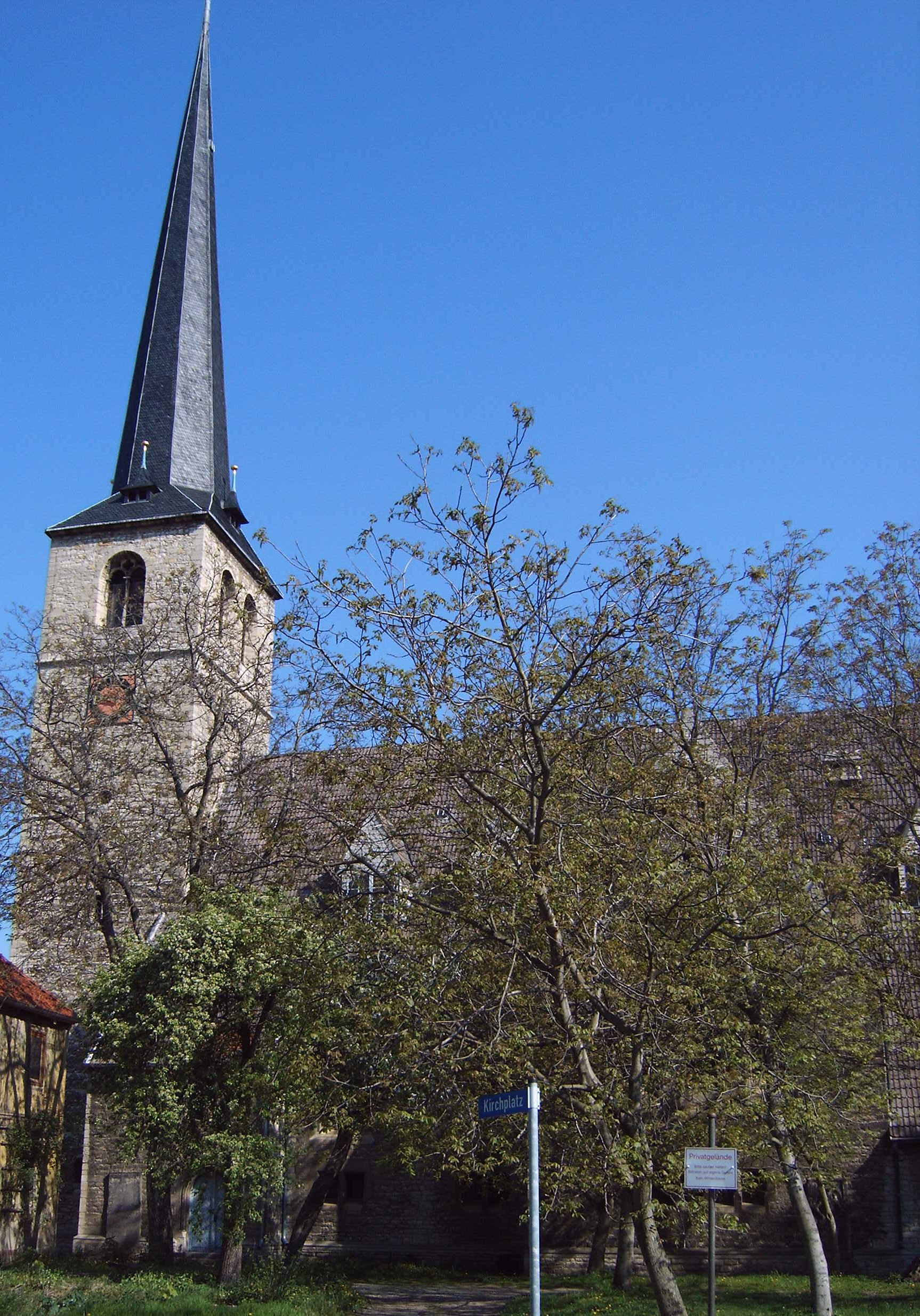 Sankt-Matin-Kirche in Gröningen